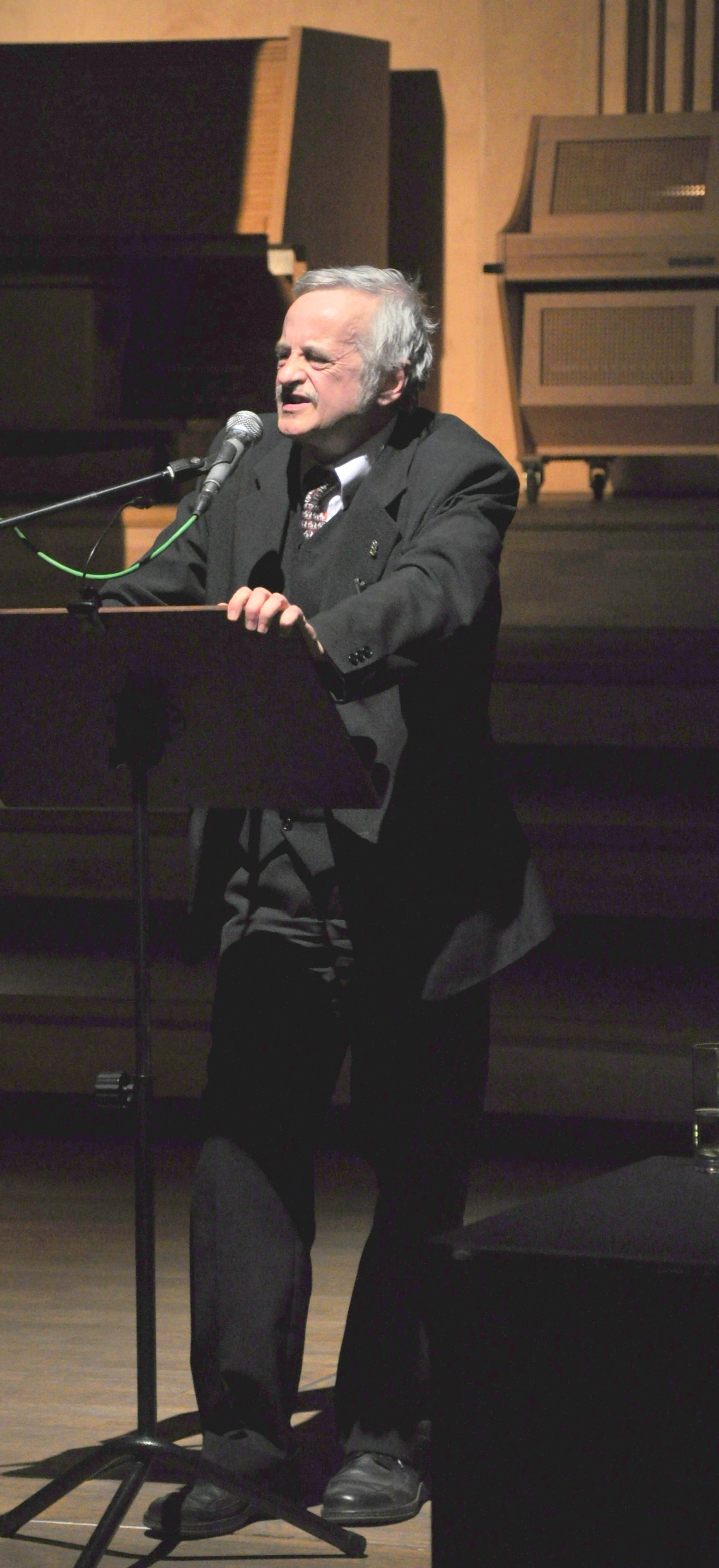 Filolog, dr Bogusław Bednarek podczas swego wykładu. Opole - Filharmonia